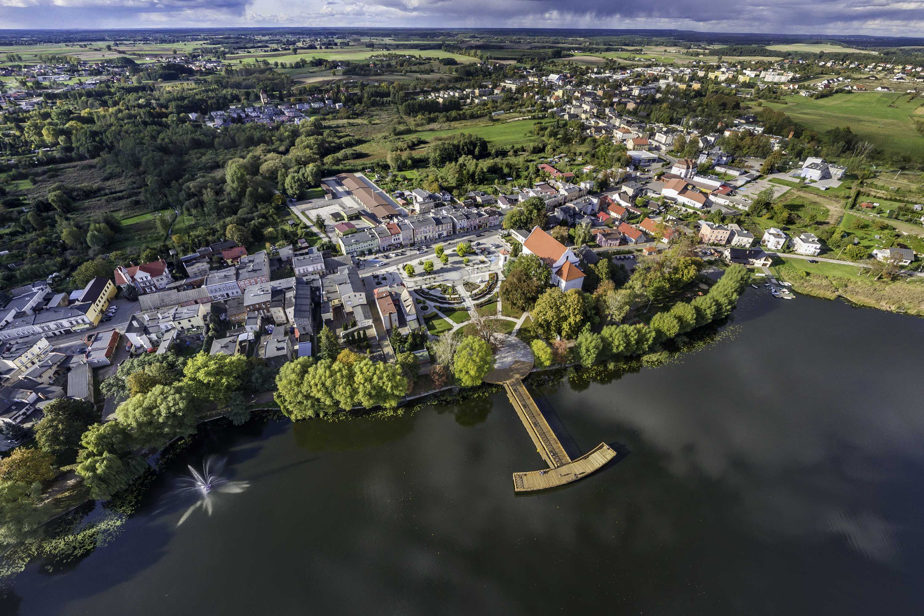 Widok na więcborski rynek i molo.